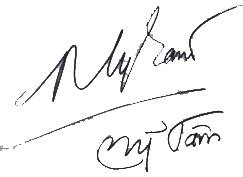 my tam